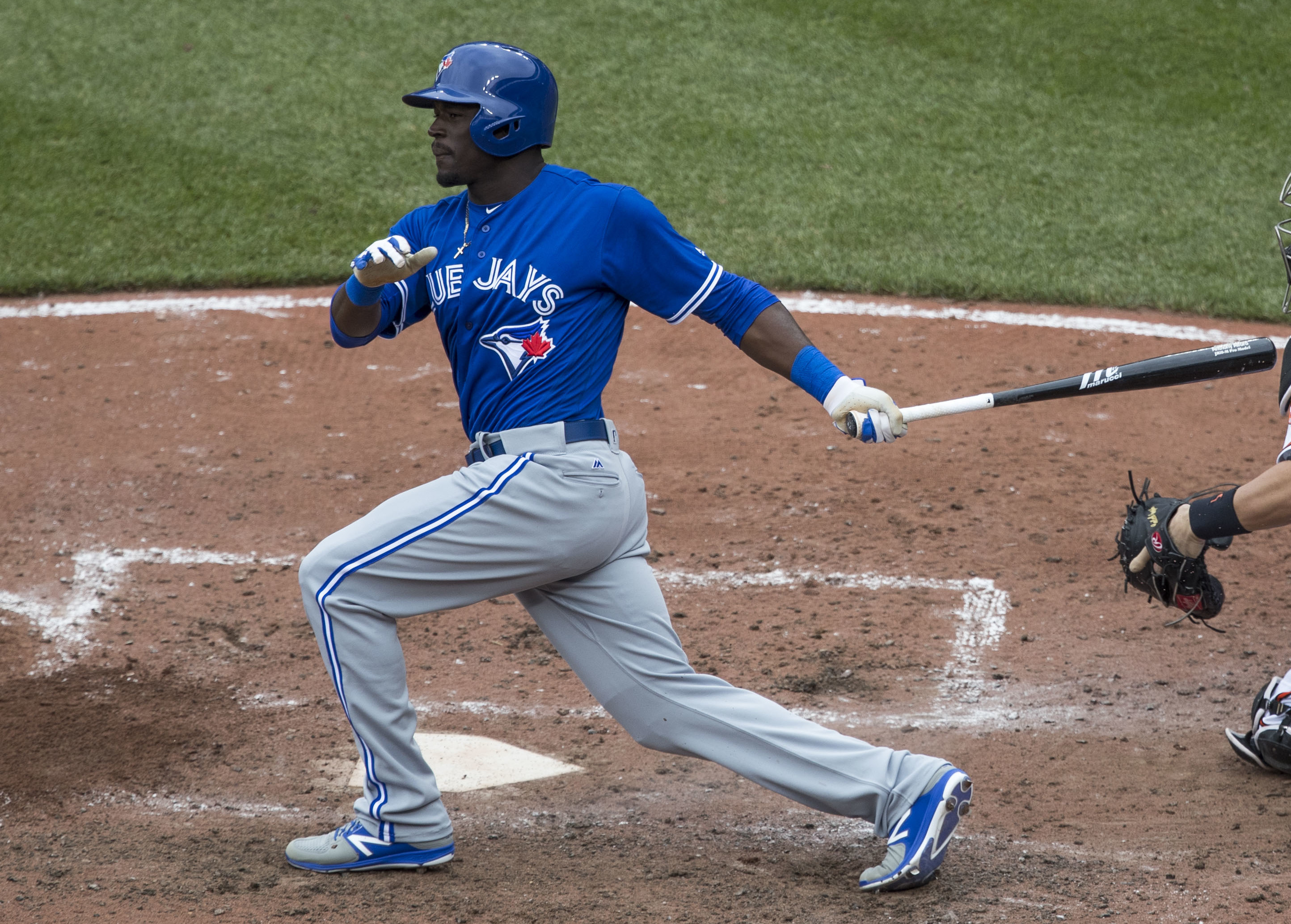 Blue Jays at Orioles 5/21/17